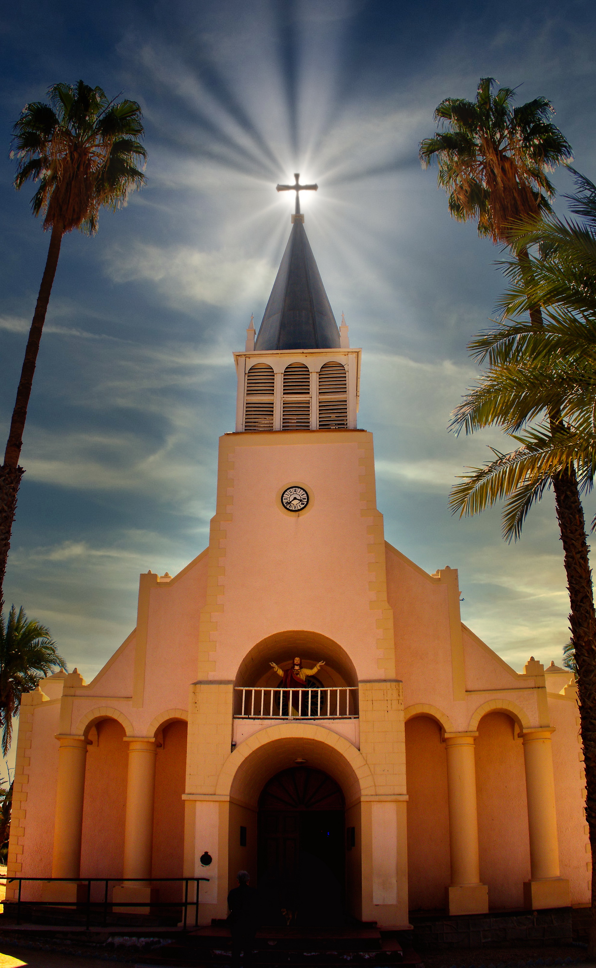 Catholic Church in Pella